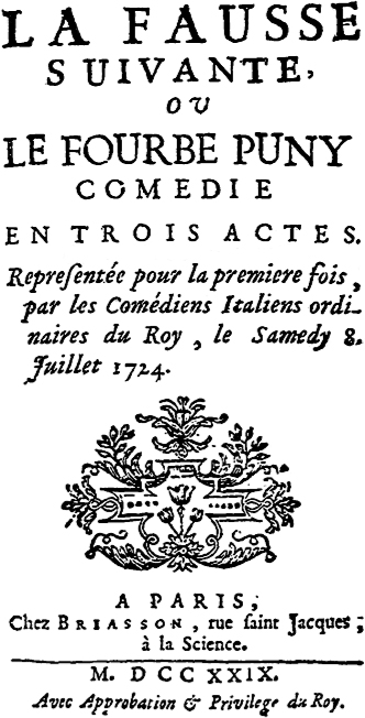 Front page of La Fausse Suivante, ou le Fourbe puni by Pierre de Marivaux (1688-1763)